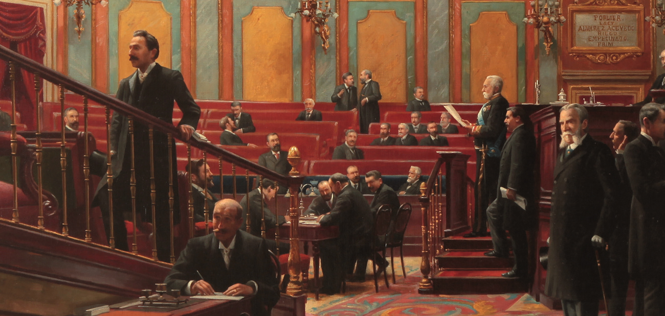 El lienzo representa la ectura de un proyecto de Ley en el Salón de Sesiones del Congreso de los Diputados de España.